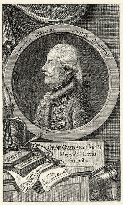 Gvadányi József (1725–1801) lovasgenerális, író. Megjelent Az Osztrák-Magyar Monarchia írásban és képben (1887–1901) kiadványban